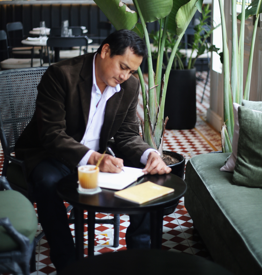 Fotografía tomada al escritor peruano Miguel Ildefonso, premio nacional de literatura peruana.